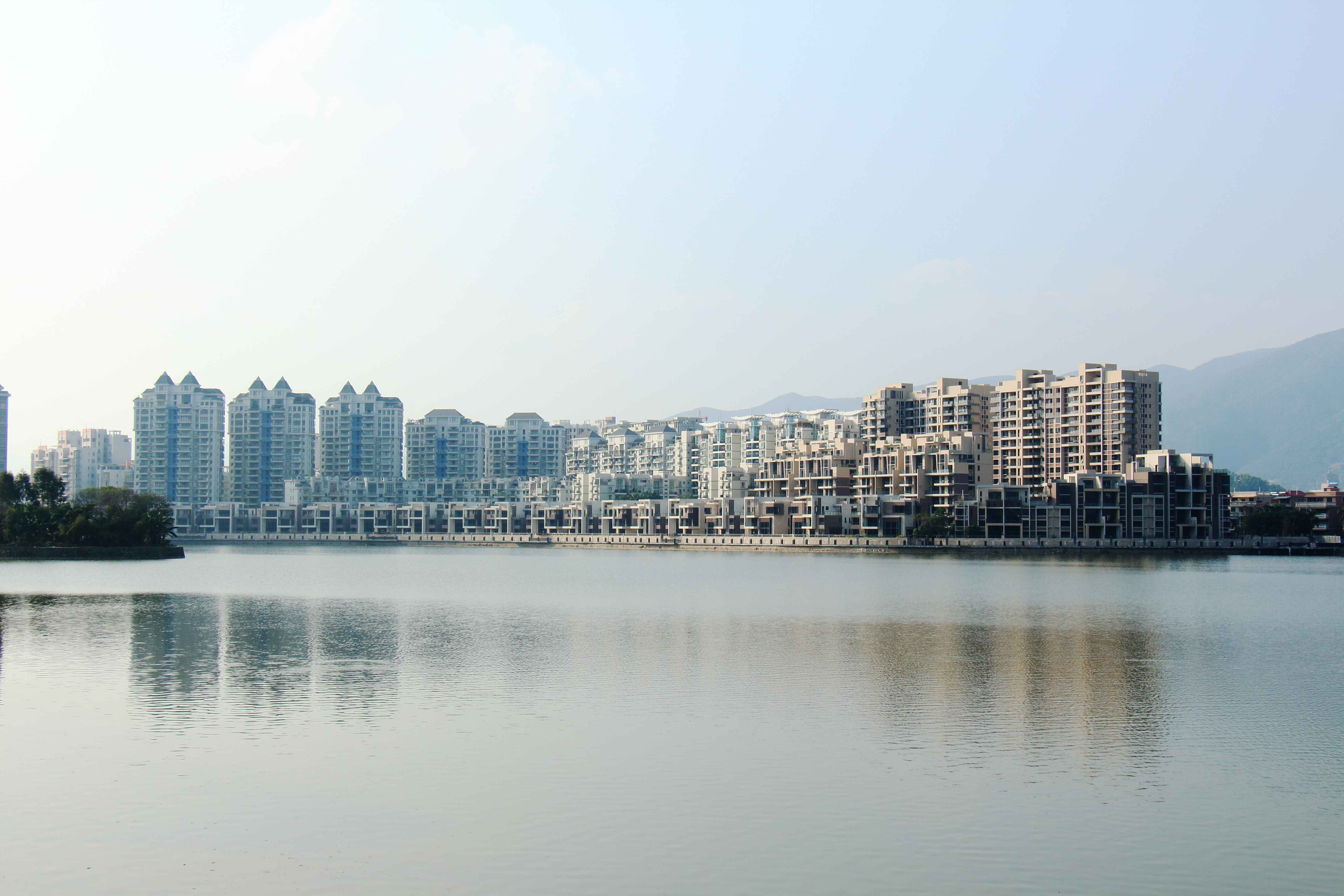 中文（中国大陆）: 新世界花园楼盘